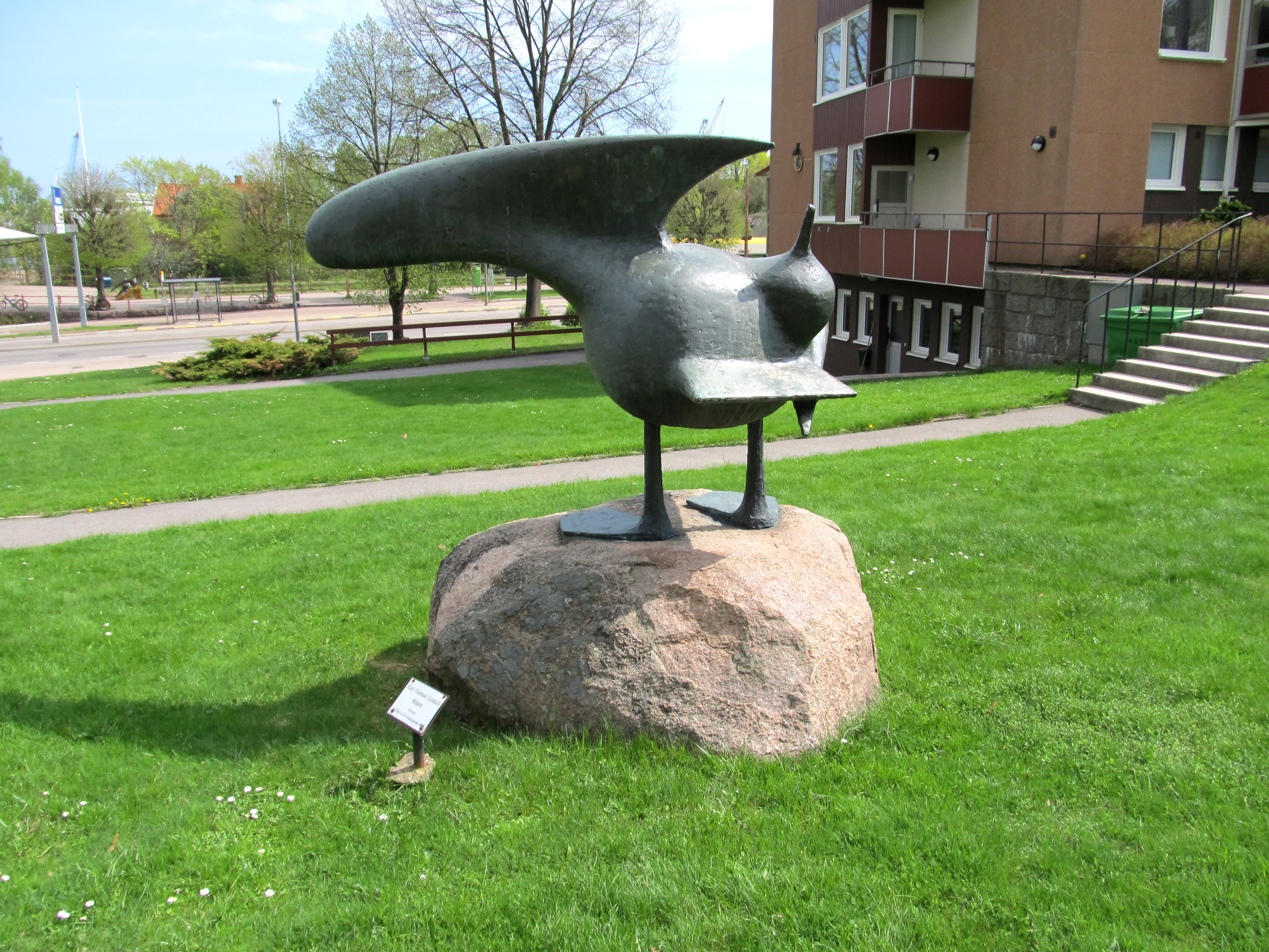 Måsen. Staty av Karl-Gunnar Lindahl. Plats: Stadsparken i Oskarshamn.